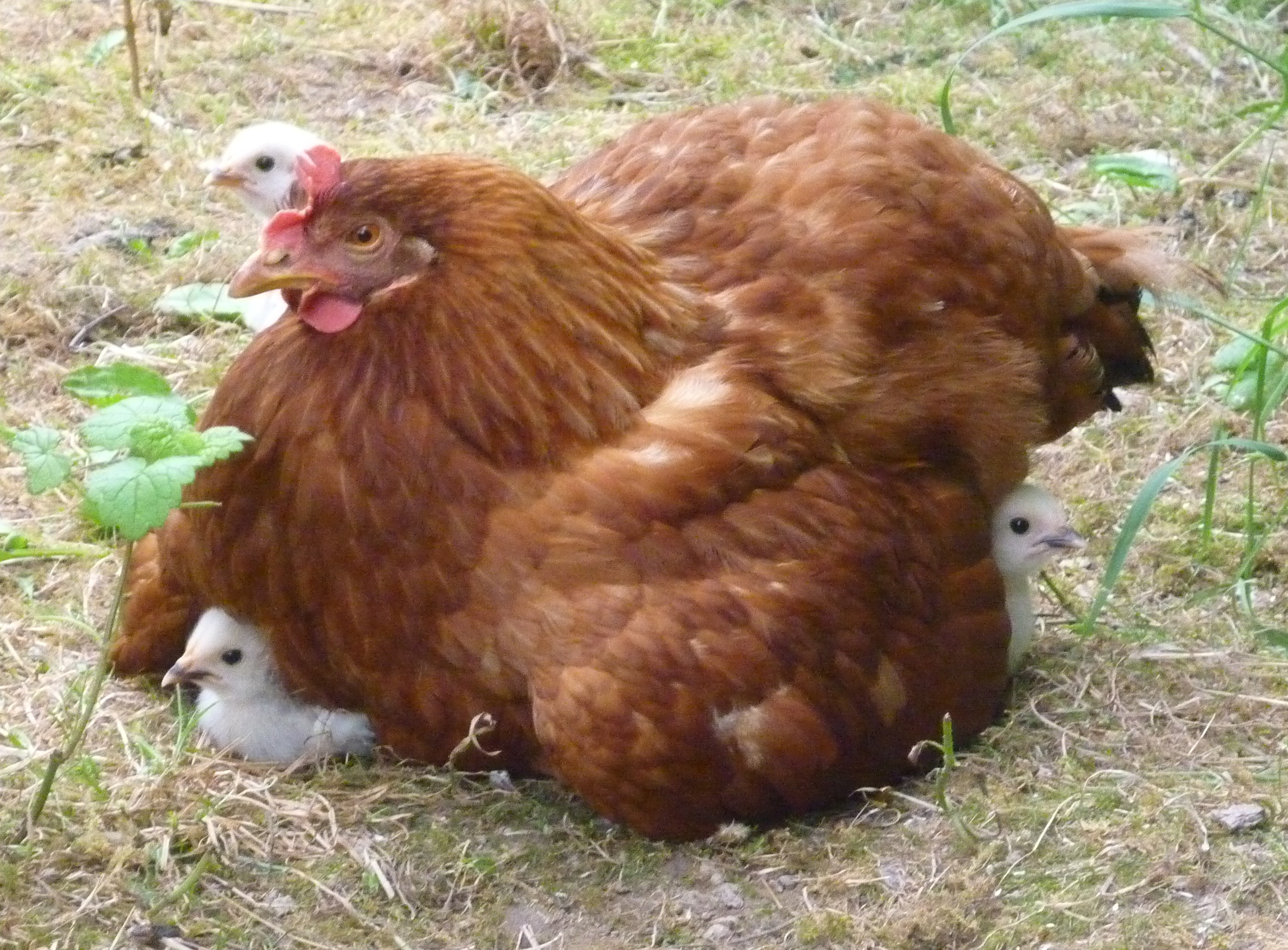 La poule et ses poussins, instinct de protection, au repos, les poussins sont sous les ailes de la poule